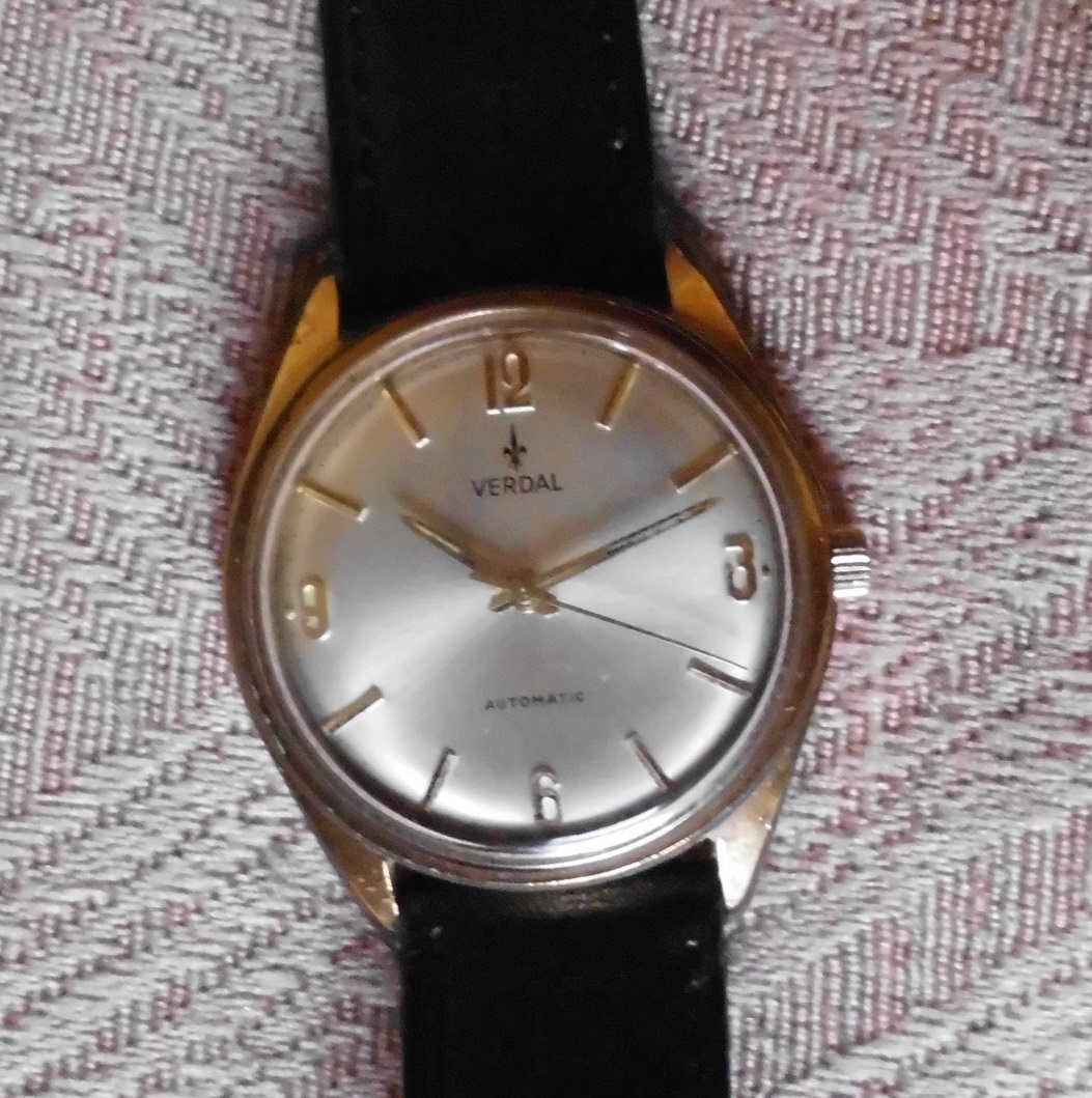 Verdal (Pronto) - Automatic - 1965 - Zwitsers uurwerk - Le Noirmont - Jura - Zwitserland